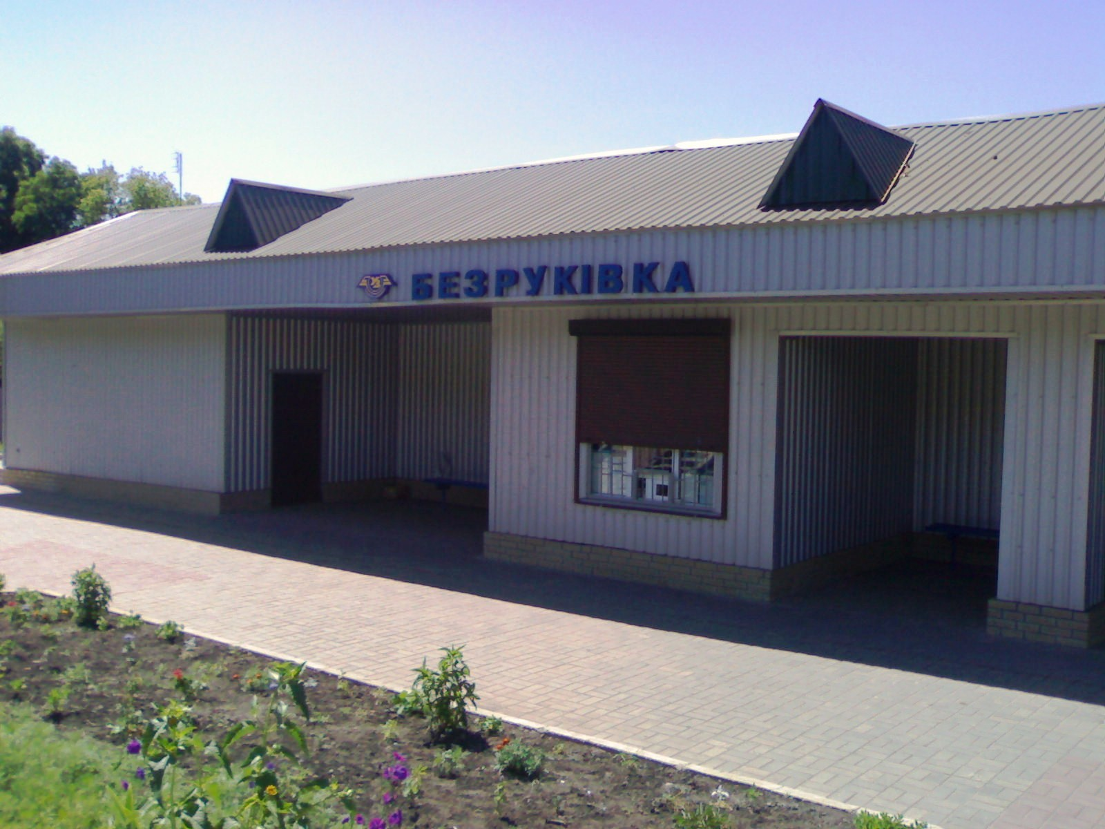 Будівля вокзалу на залізничнії платформі Беруківка, Харківській залізничний вузлел Південної залізниці.